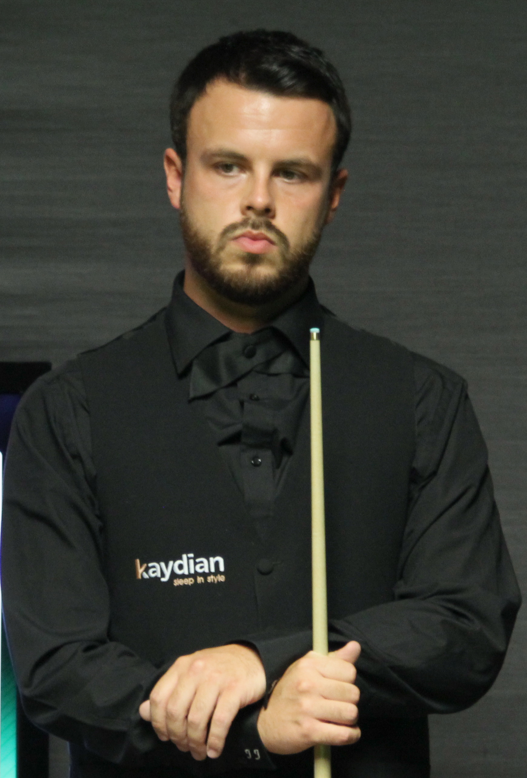 John Astley beim Paul Hunter Classic 2016